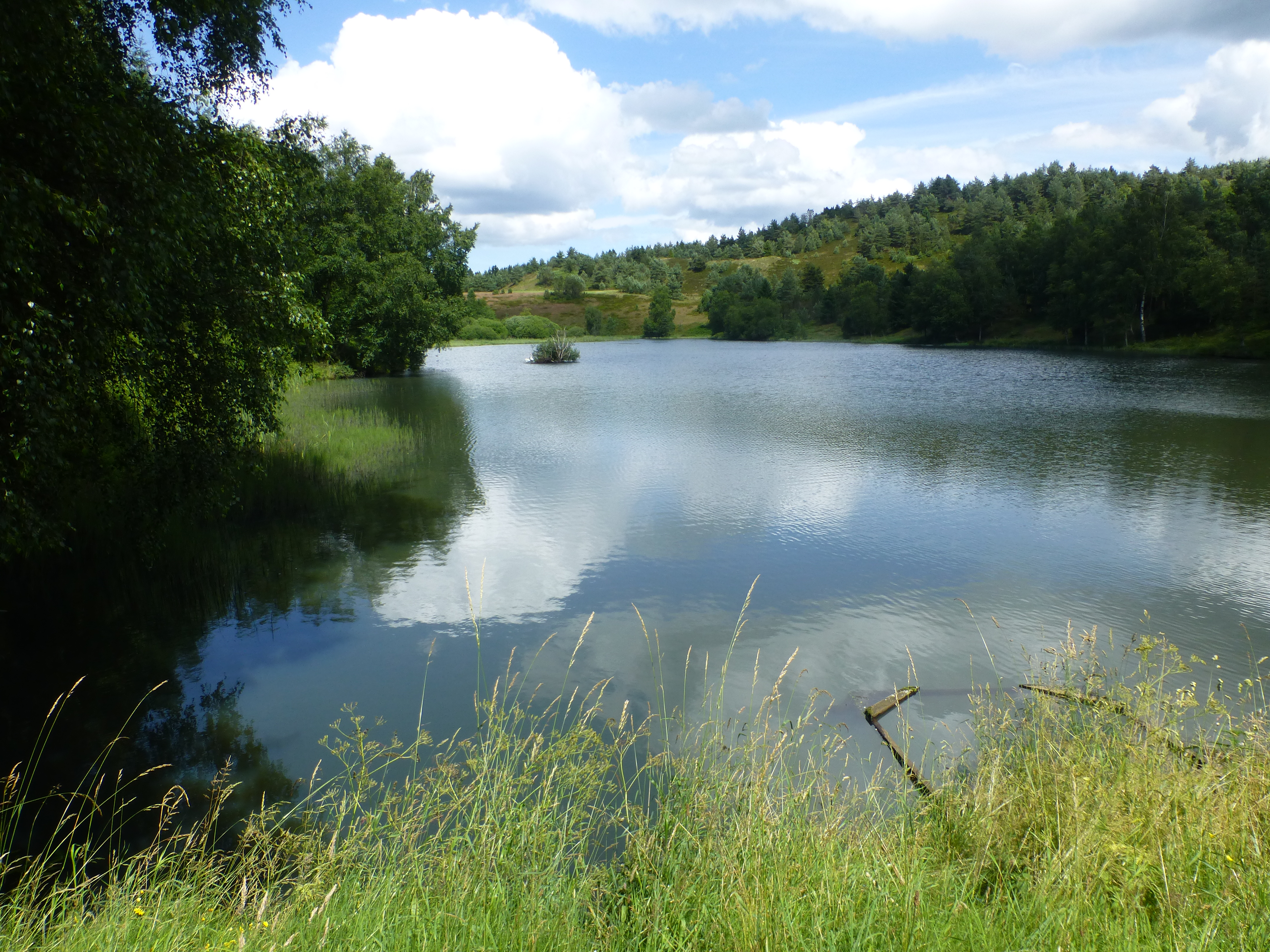 Kolsø i Skærbæk/Store Hjøllund Plantage